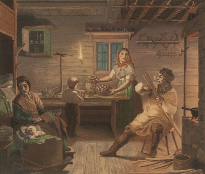 Hämäläisiä kansanpukuja ja iltatoimia 1878